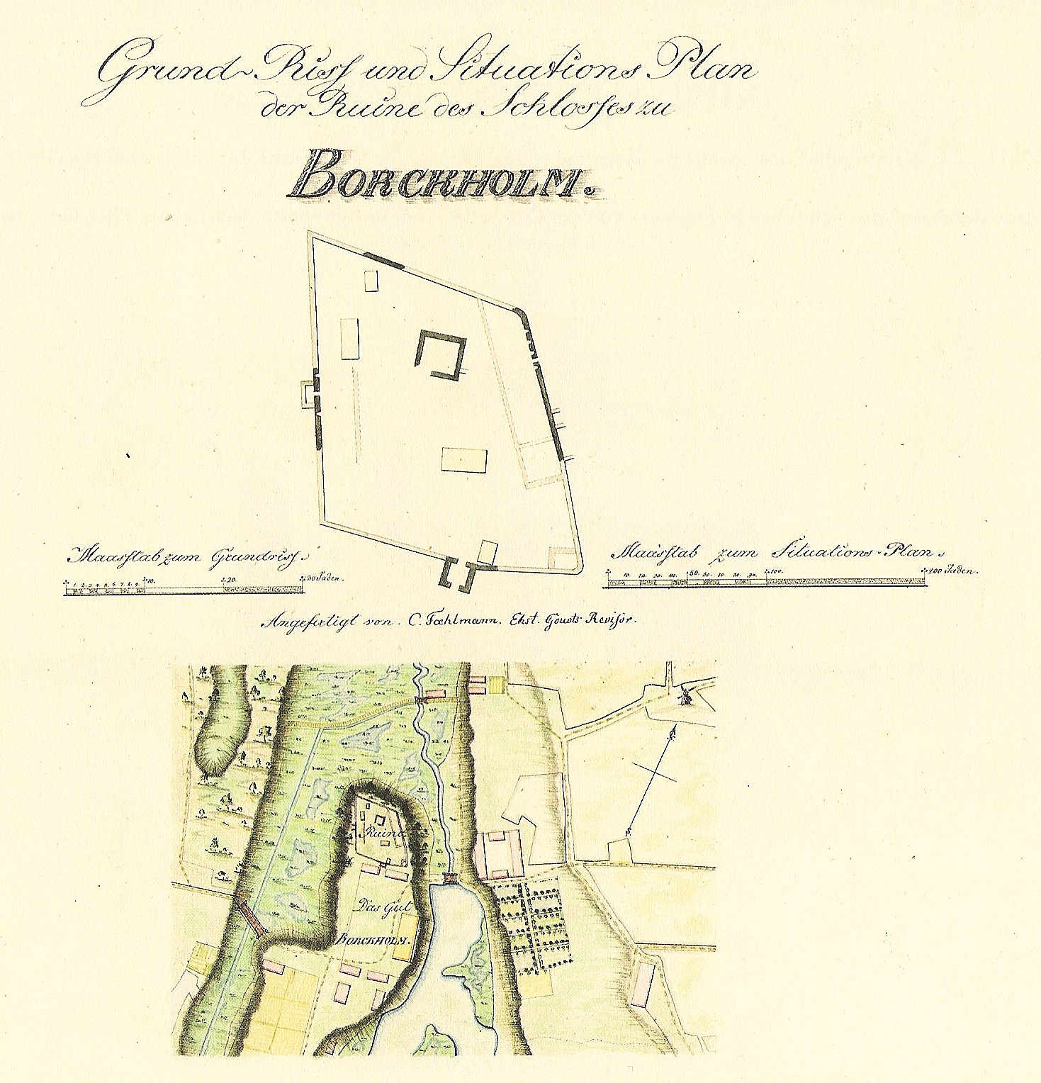 Porkuni linnuse asendiplaan. Paulucci album